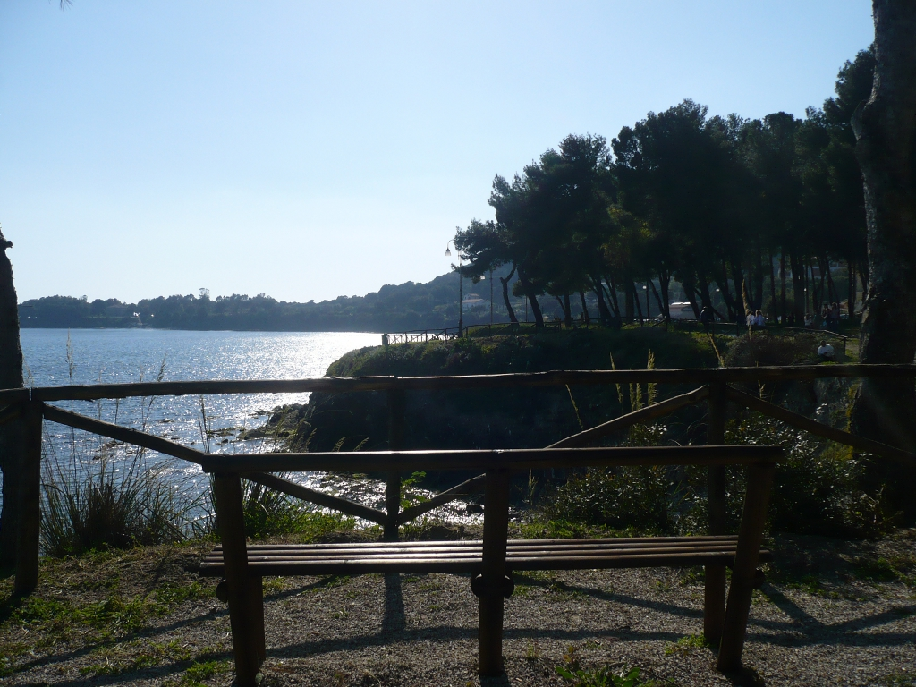 La pineta di Ogliastro Marina, affiancato dal sentiero naturale "Antica Oliarola" lungo il mar Tirreno nel comune di Castellabate